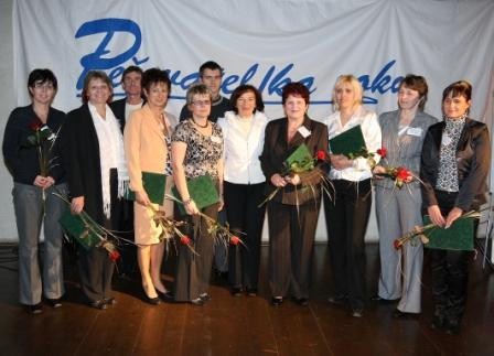 Vyhlášení výsledků Pečovatelka roku 2008